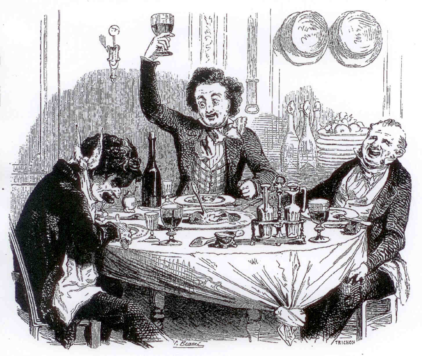 Trois Goguettiers, MM. Beaumignard, Grassouillet et Maltourné. Dessin de Beaucé.